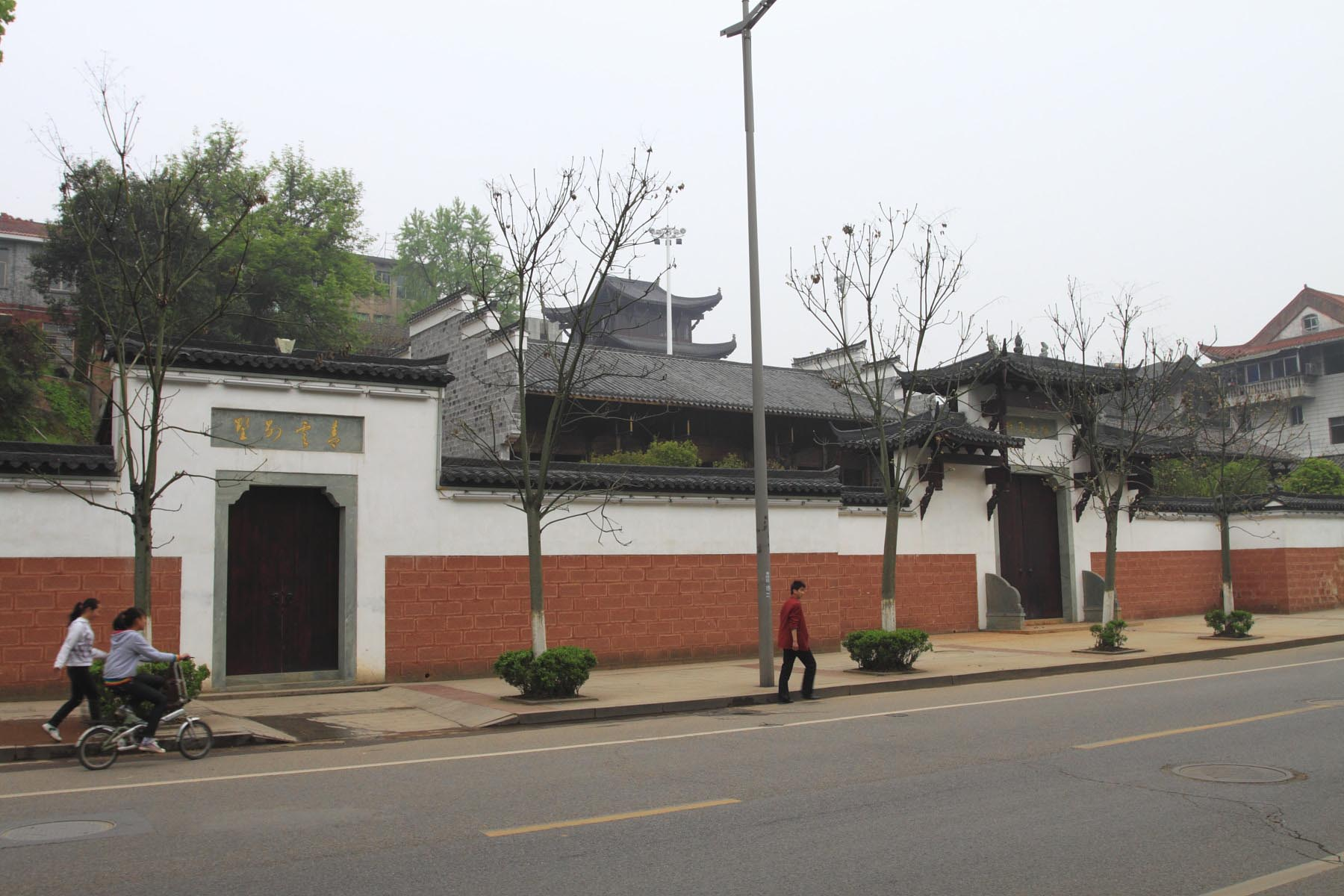 江西上饶信江书院，江西省文物保护单位